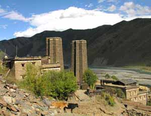 Wehrtürme in Minyag, dem südlichen Nachbarraum des Gyarong im Osten des Tibetischen Hochlandes sind typisch für die schluchtenreichen Gegenden des Gyarong Sonstiges: ...